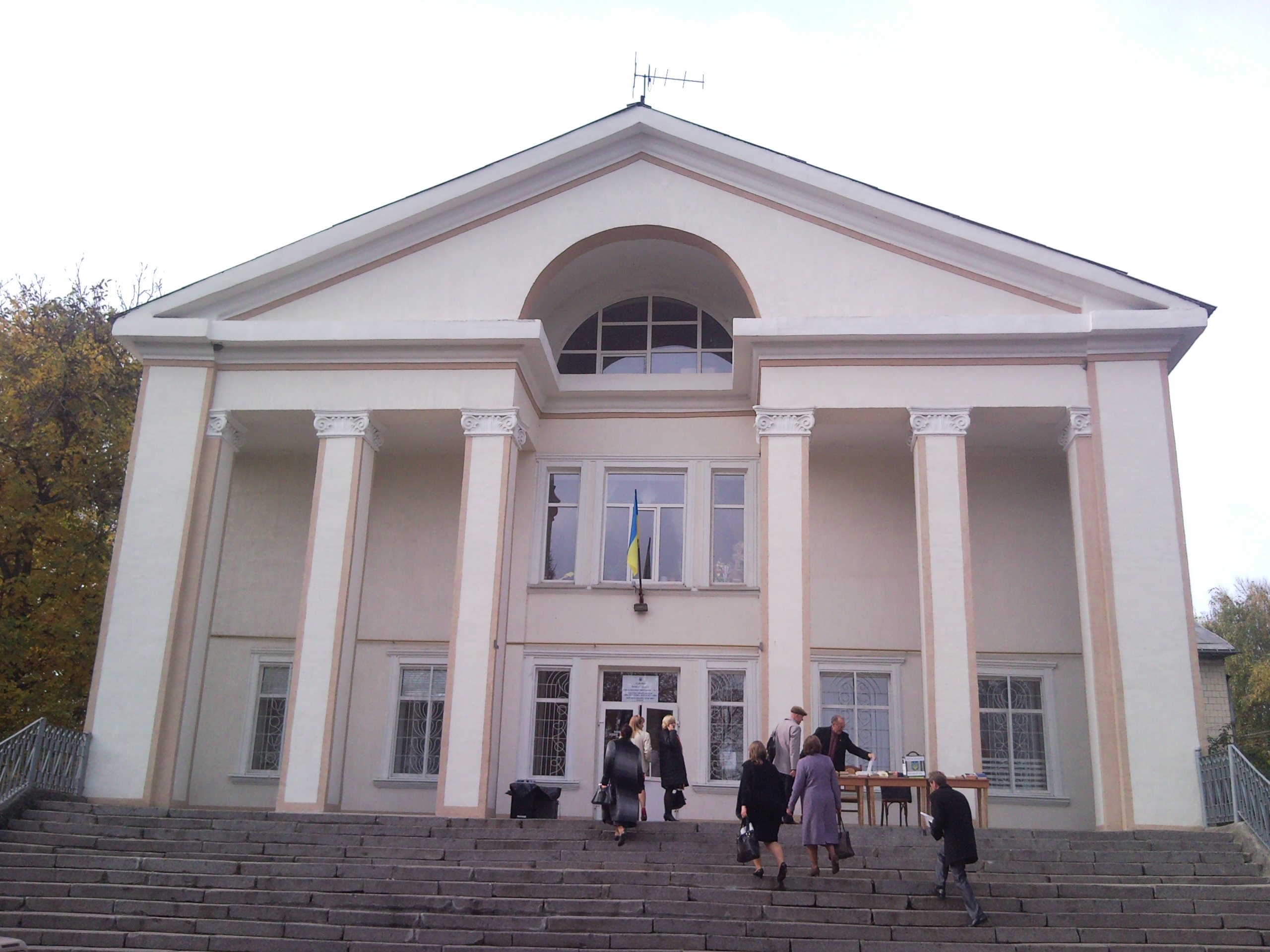 Тростянець Палац культури